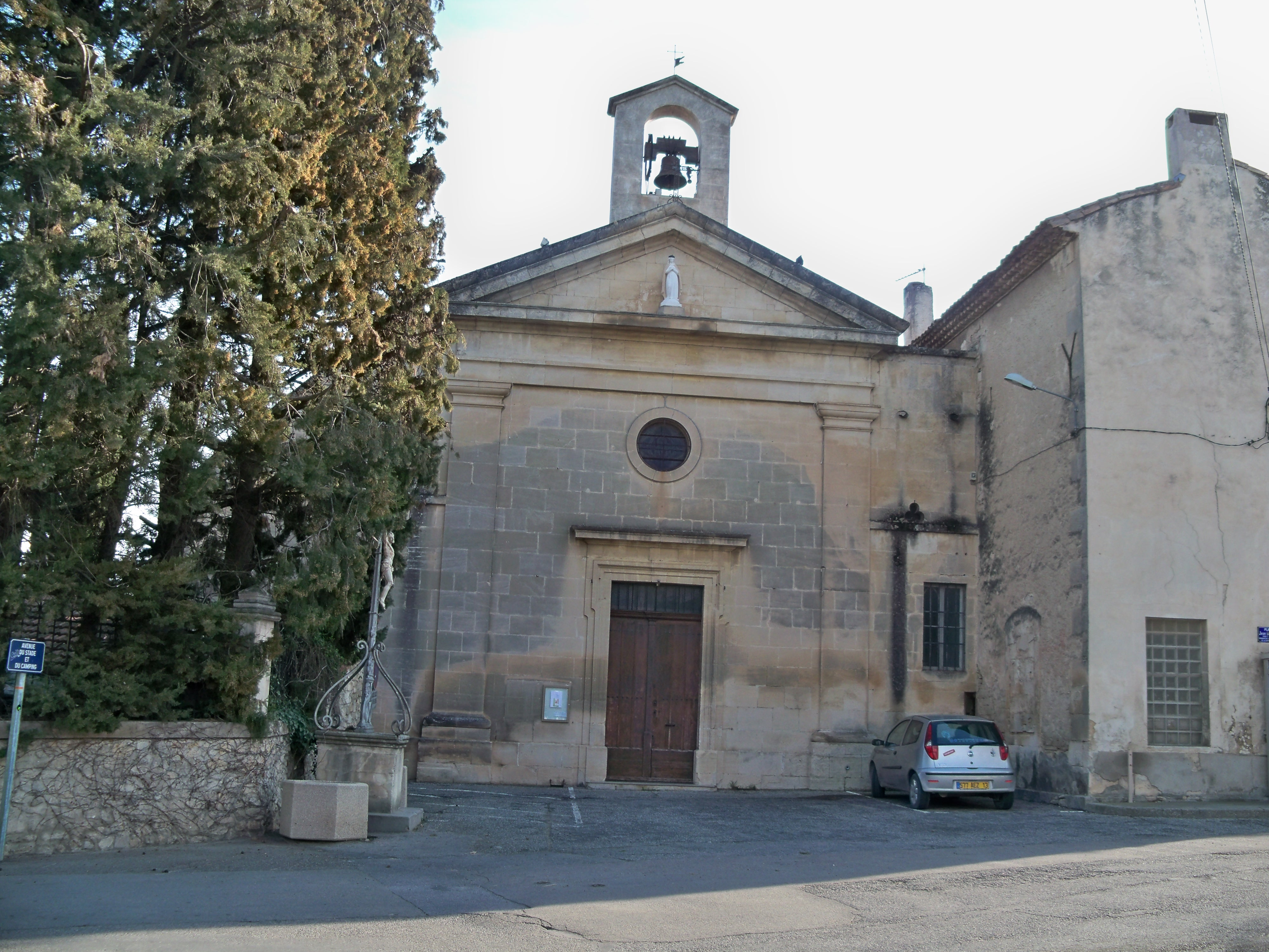 église de Saint-Étienne-du-Grès (13), Alpilles, France